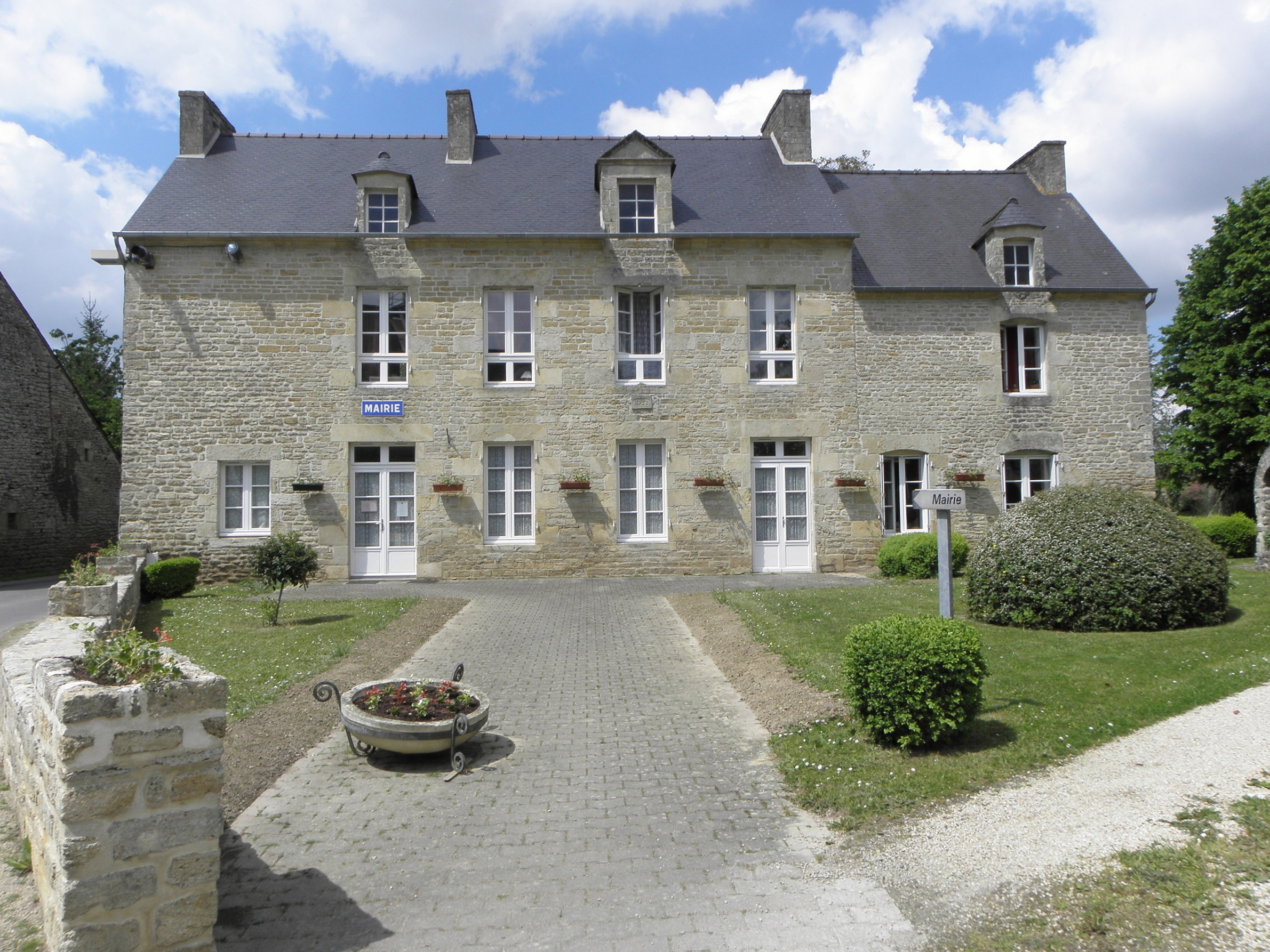 Mairie de Tréfumel (22).